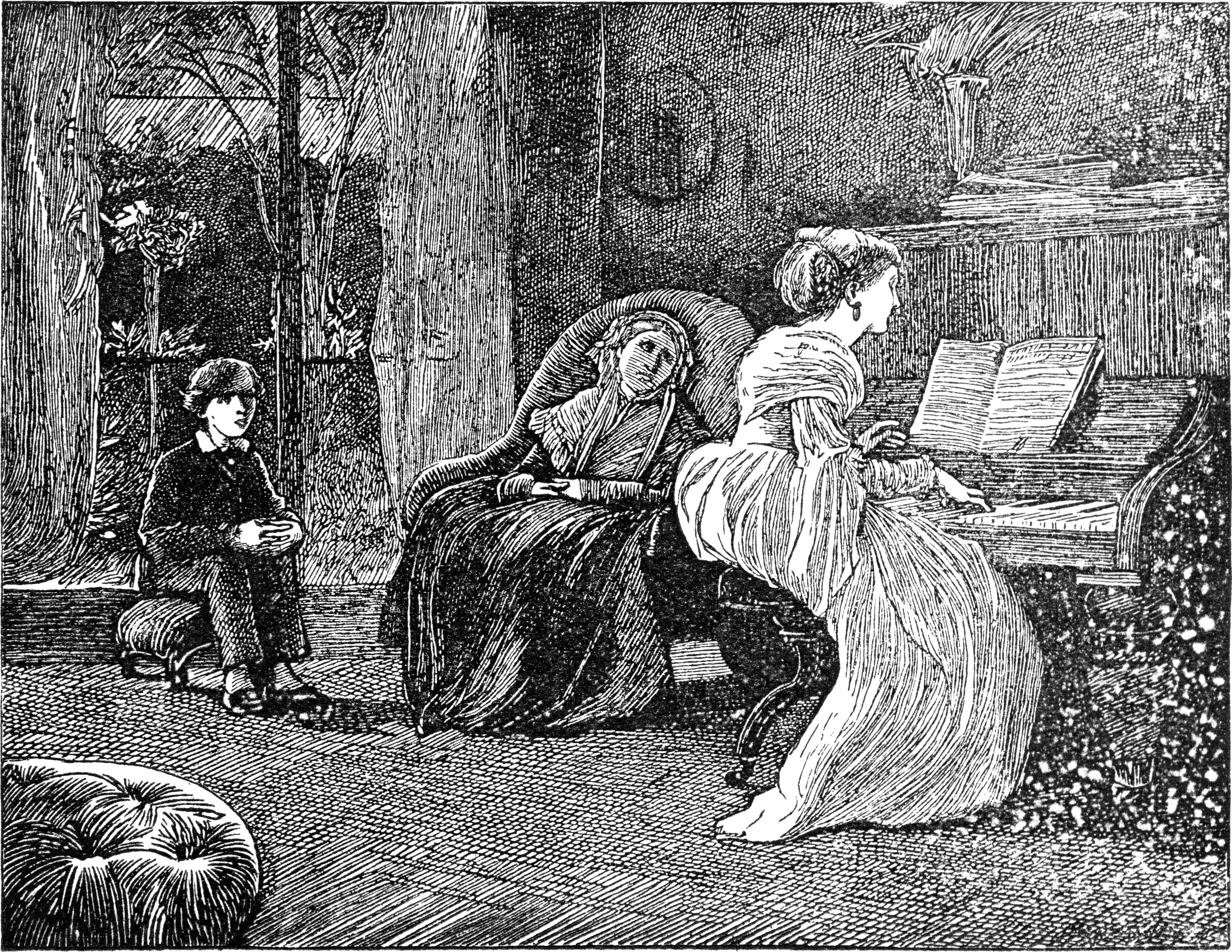 Illustration på sida 157 ur boken Oliver Twist: Samhällsroman från 1898